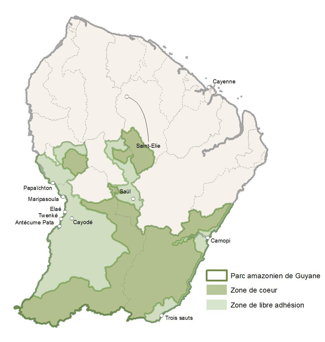 Zonage du Parc amazonien de Guyane